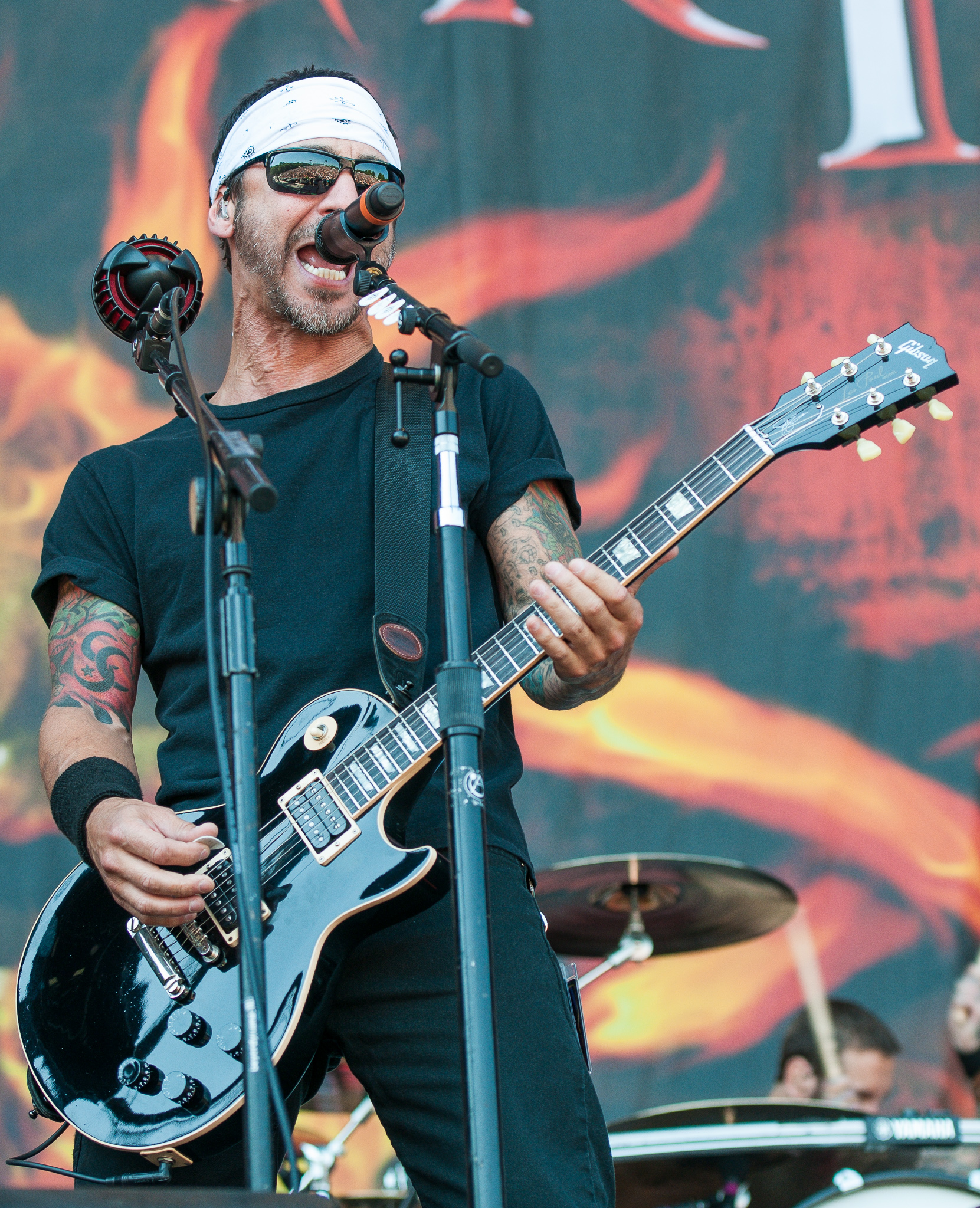 ARGO-Konzerte,Beck's Park Stage,Festival,Godsmack,Konzert,Livekonzert,Livemusik,Musik,RiP,Rock im Park 2015,Salvatore Paul Erna,Sully Erna